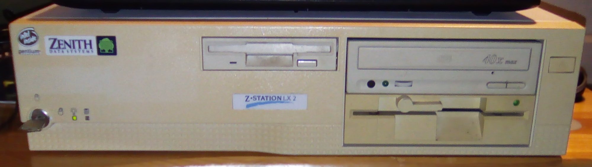 Image représentant un ordinateur Zenith Data Systems de 1996